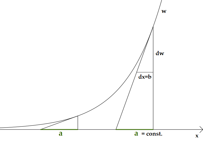 Une courbe exponentielle et sa propriété : les sous-tangentes dont constantes